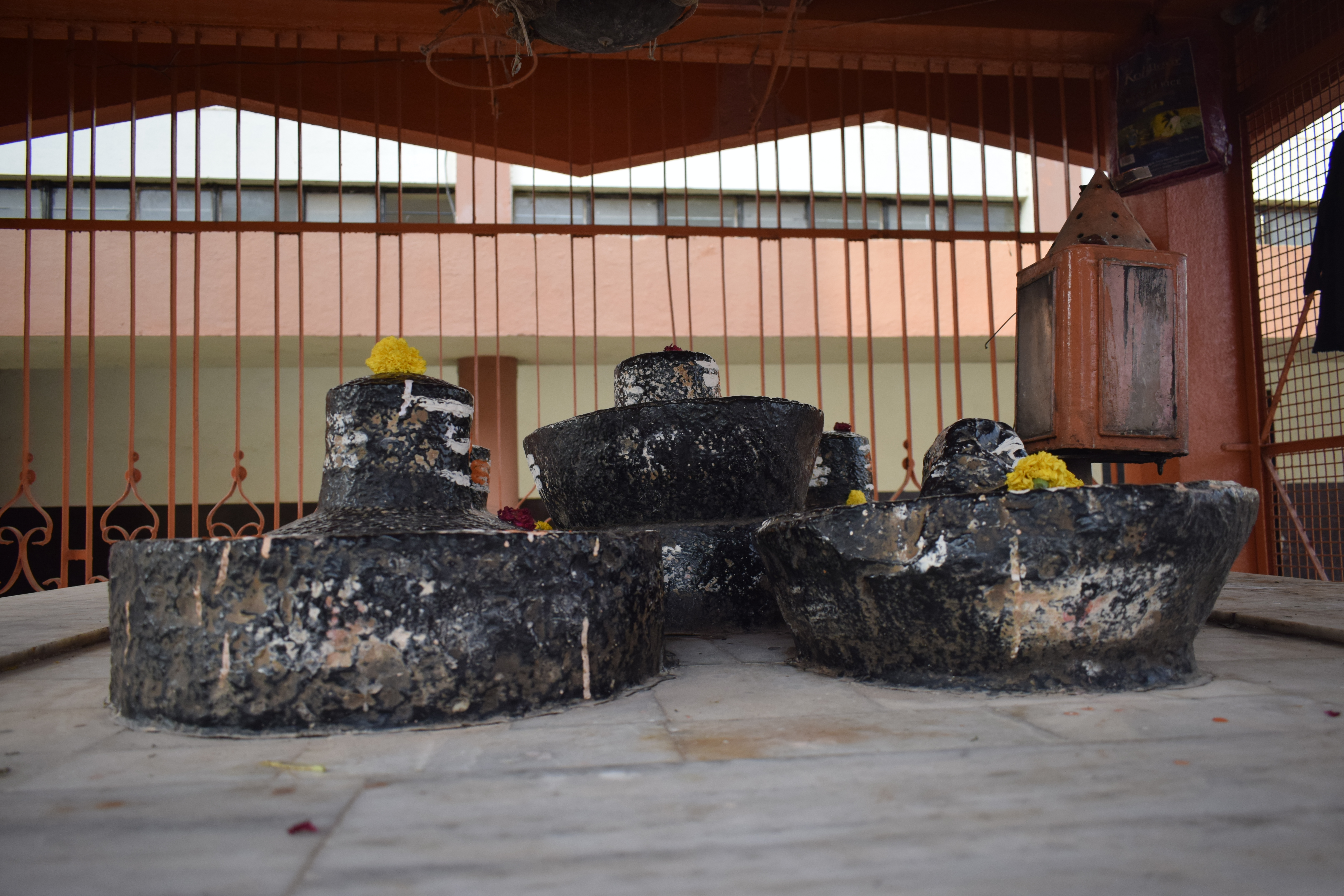 श्री बालयोगीश्वर लिंग